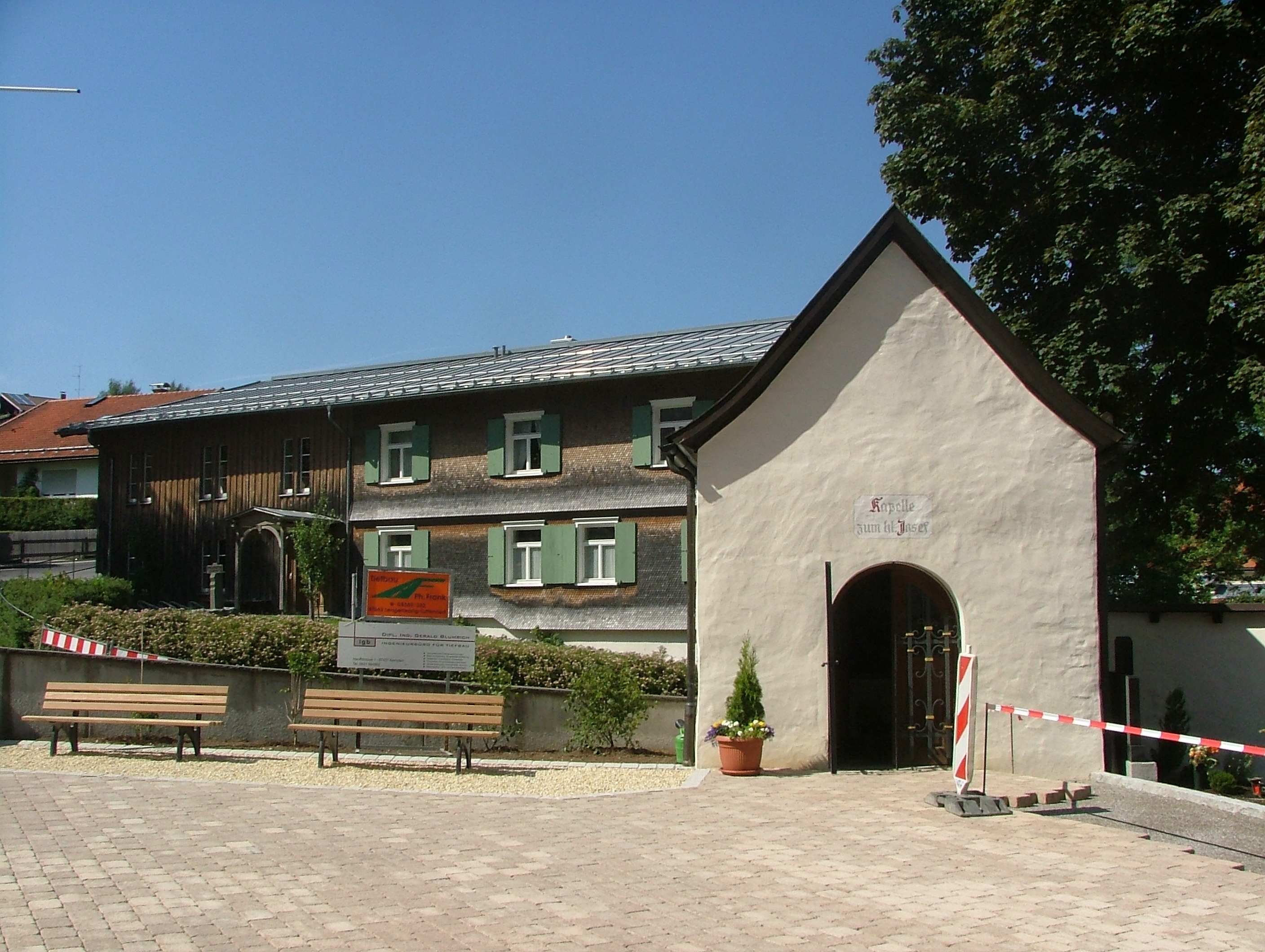 Wertach